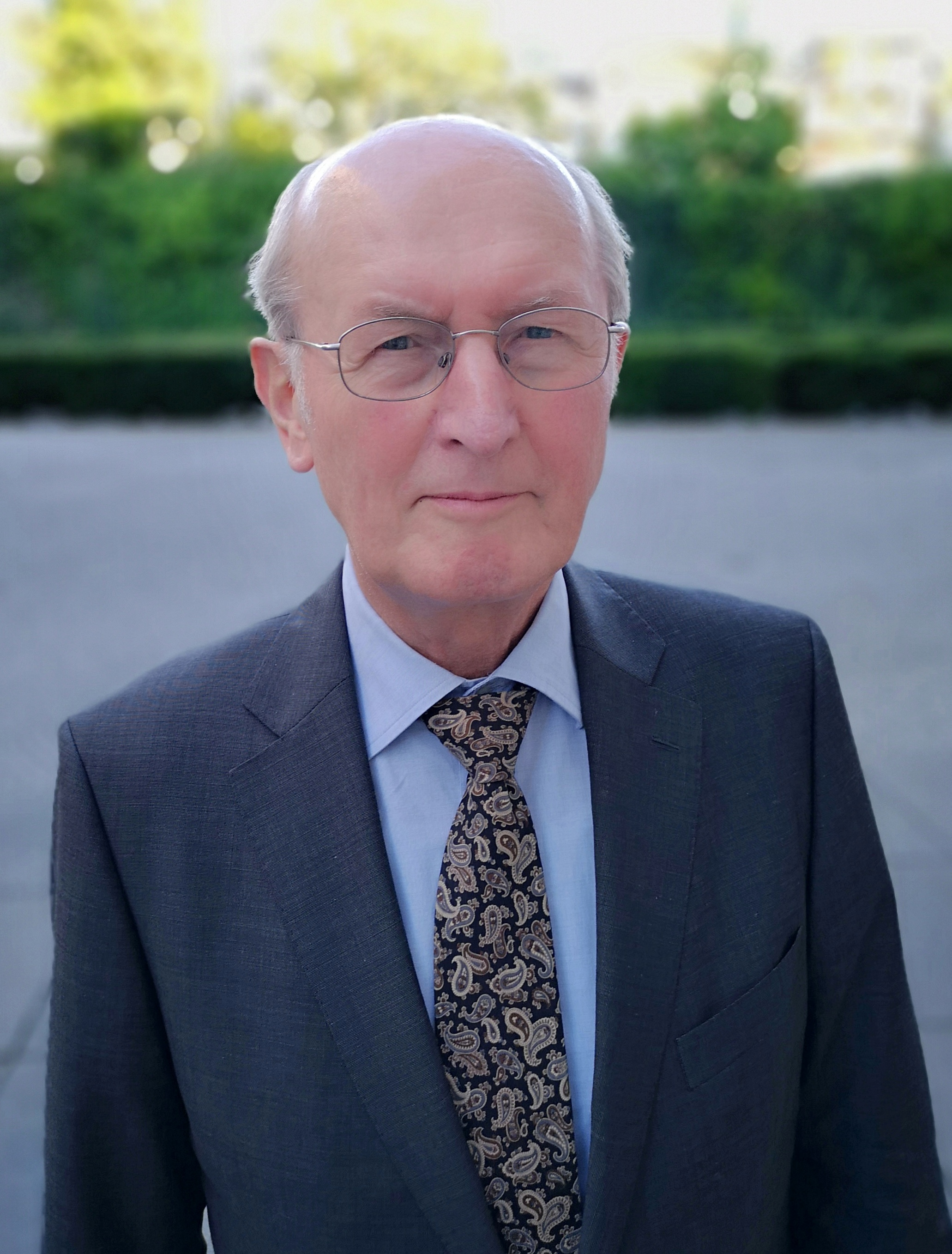 Jochen Borchert (2018), Verleihung des Verdienstordens des Landes Nordrhein-Westfalen 2018